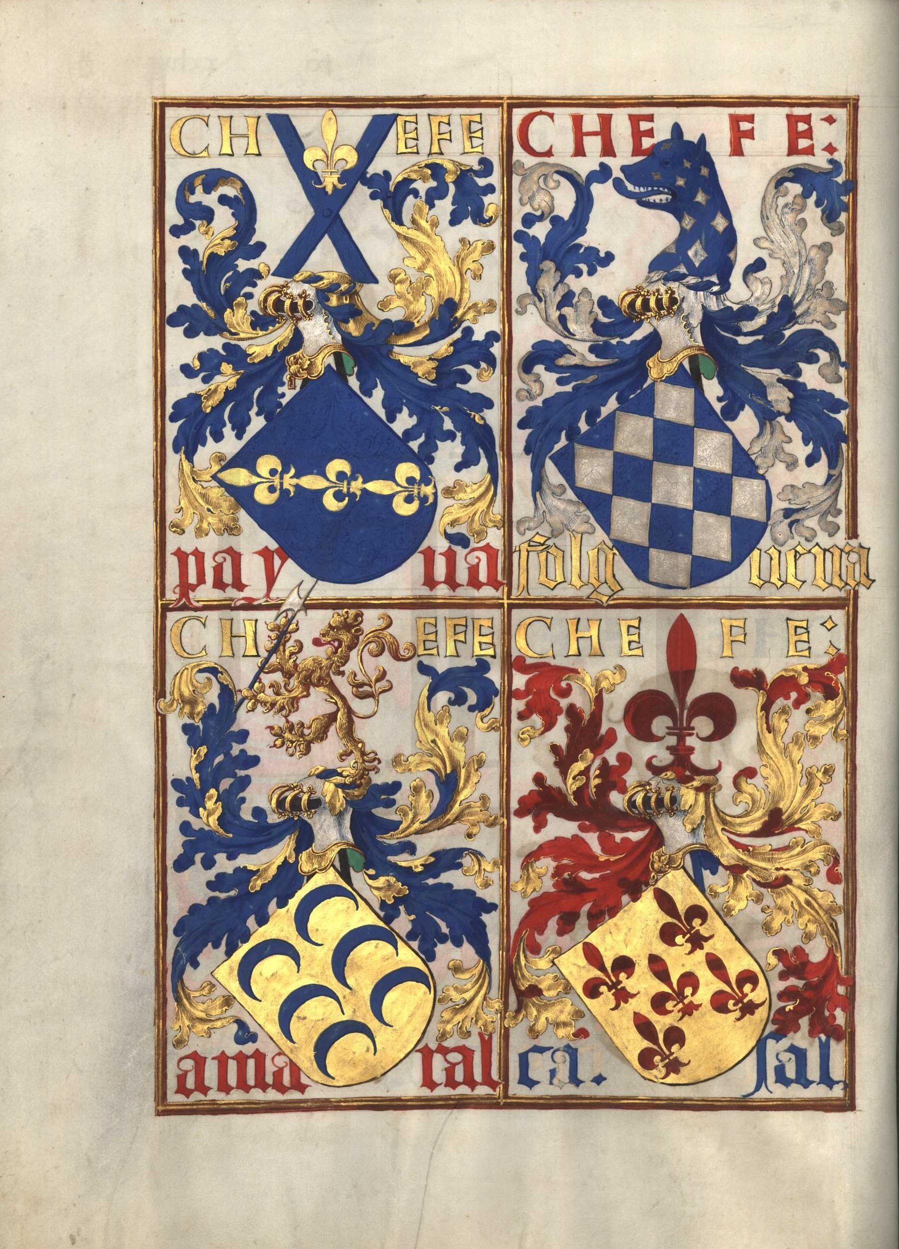 Livro da Nobreza e Perfeiçam das Armas (fl 27v)